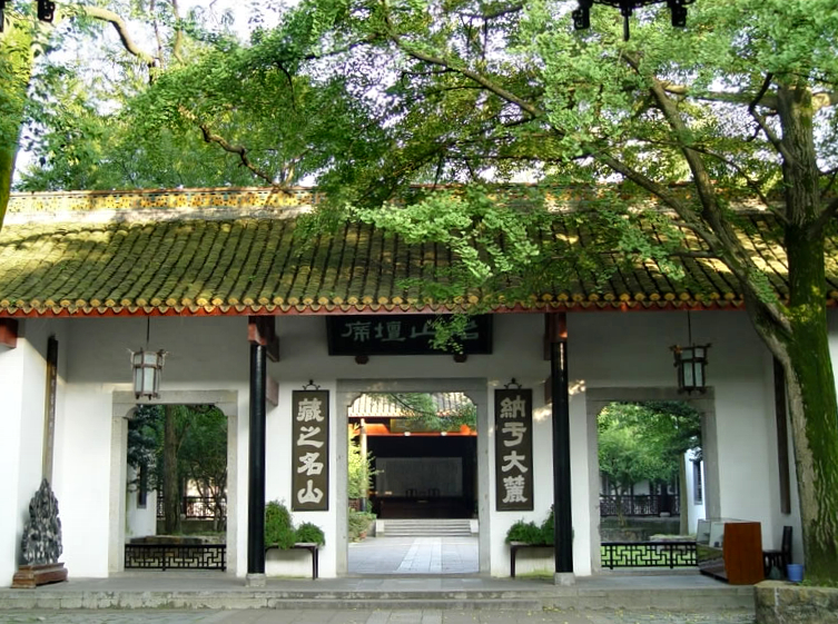 二门